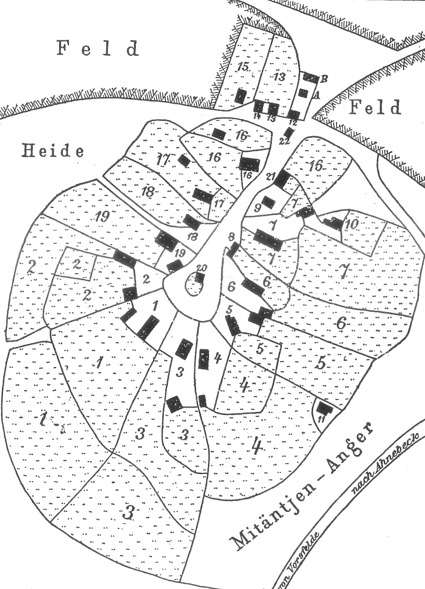 Grundstücksplan von Wendschott von 1759. Die Nr. sind: 1-7 Ackerhöfe, 9 und 16-19 Vollköter, 8 und 10 und 11 und 13 und 15 Stückenköter, 12 und 14 Brinksitzer, 20 Schule, 21 und 22 Hirtenhäuser, A und B Anbauer